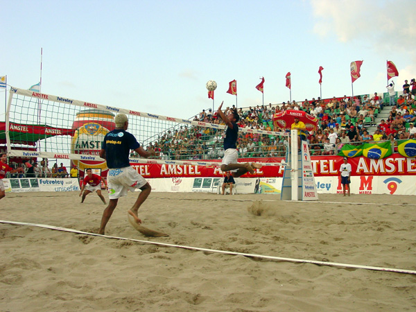 World Open Valencia 2005 (Spain - Brazil) - Spielszene Footvolley